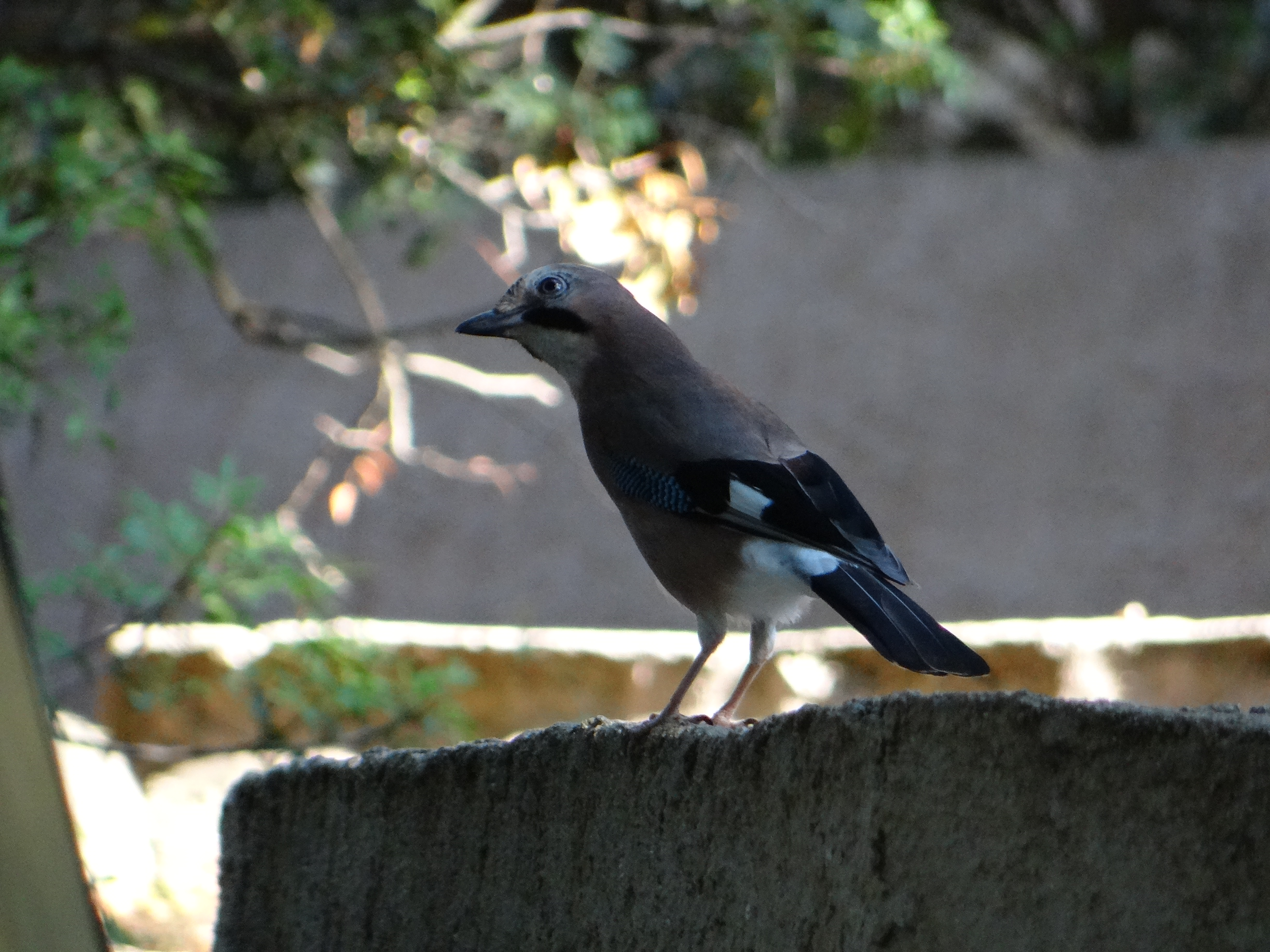 Sous-espèce corse du Geai des chênes : Garrulus glandarius corsicanus Laubmann, 1912